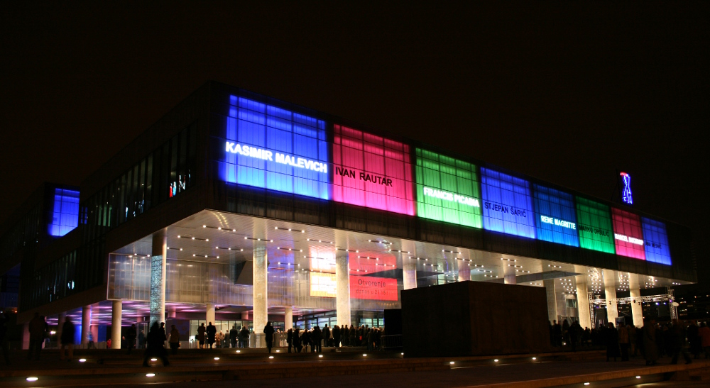 Muzej suvremene umjetnosti u Zagrebu